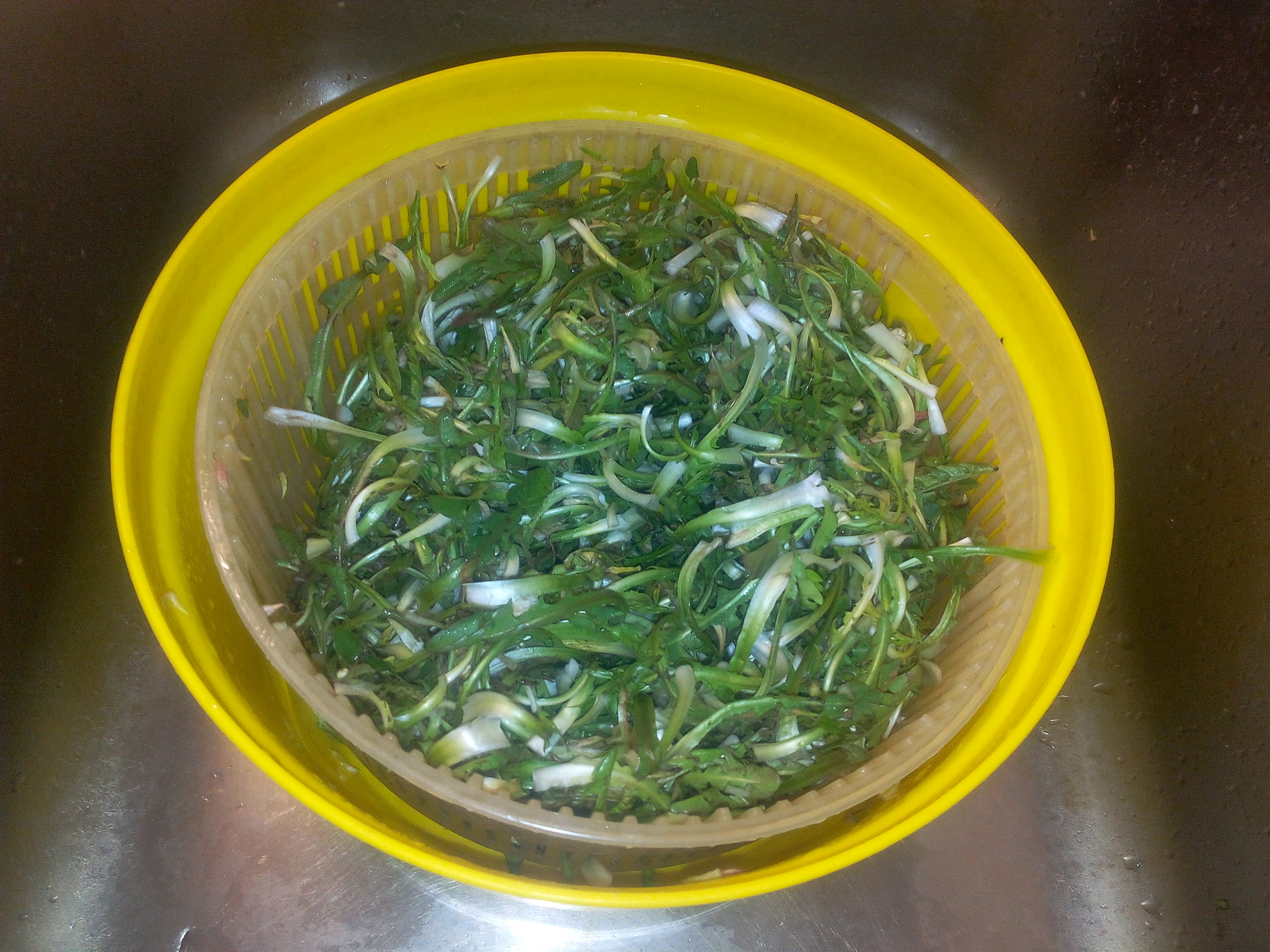 Tarassaco per insalata Piemontèis: Salada dij prà